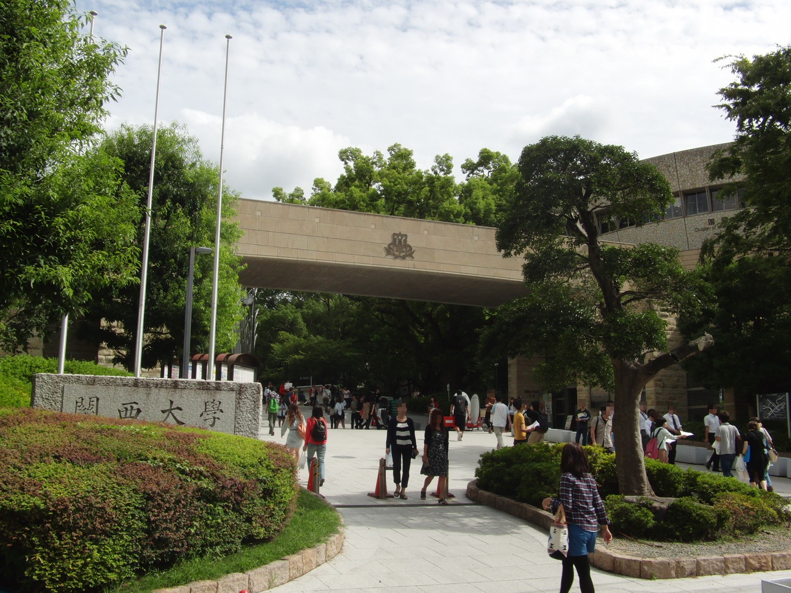 関西大学正門を撮影